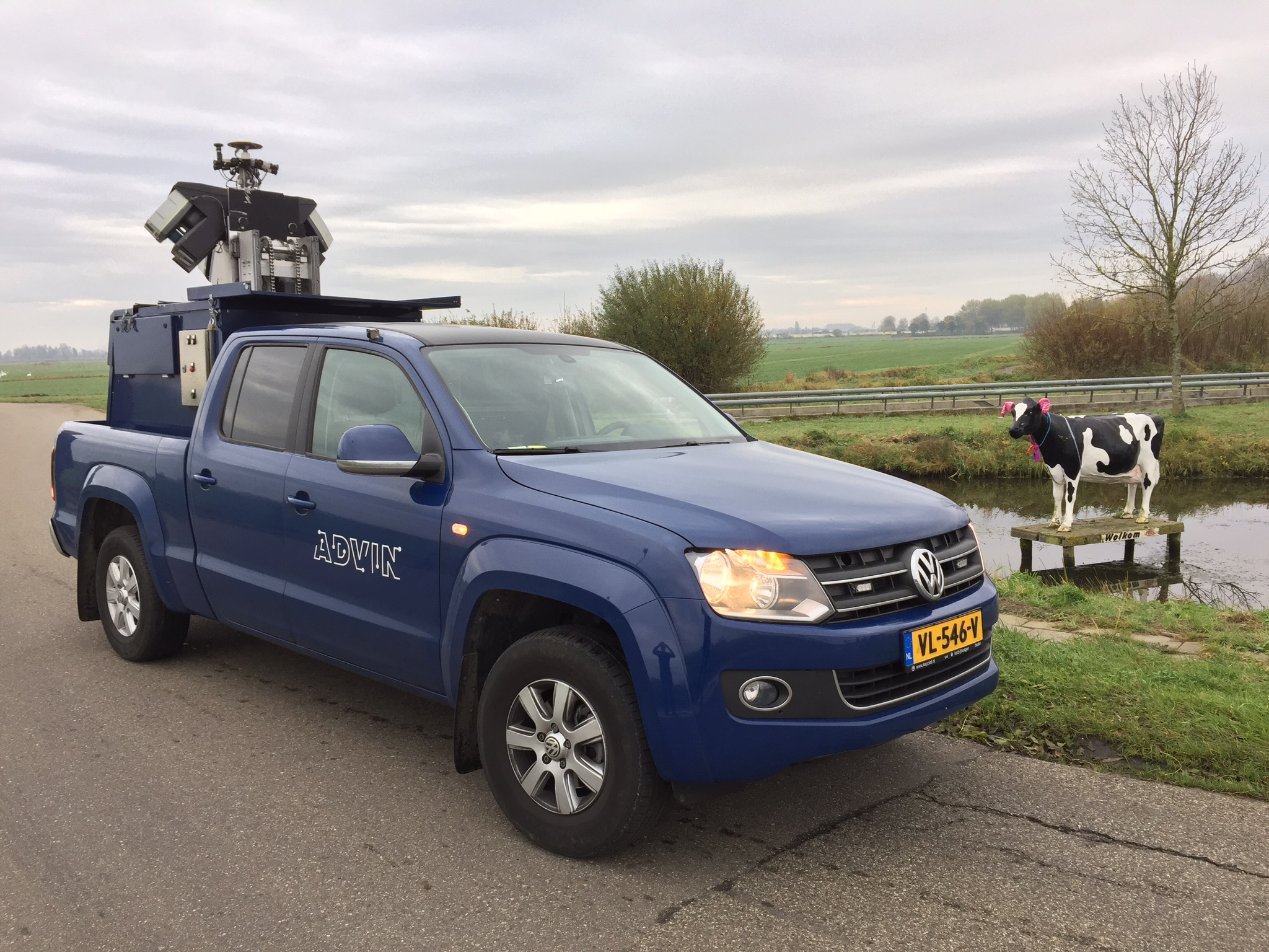 3D mobile laserscanning truck in Lemmer, Friesland